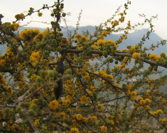 Acacia caven Molina, scrubland central Chile, flowered stems Species Acacia caven Genus Acacia Subfamilia Mimosoideae